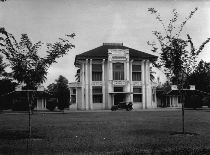 Foto. De overjarige cultures ter oostkust van Sumatra in woord en beeld. Door de A.V.R.O.S. eerbiedig opgedragen aan Z.E. den Gouverneur-Generaal van Nederlandsch-Indië Mr. D. Fock. Het proefstation van de A.V.R.O.S. (Algemeene Vereeniging van Rubberplanters ter Oostkust van Sumatra) in Kampong Baroe nabij Medan